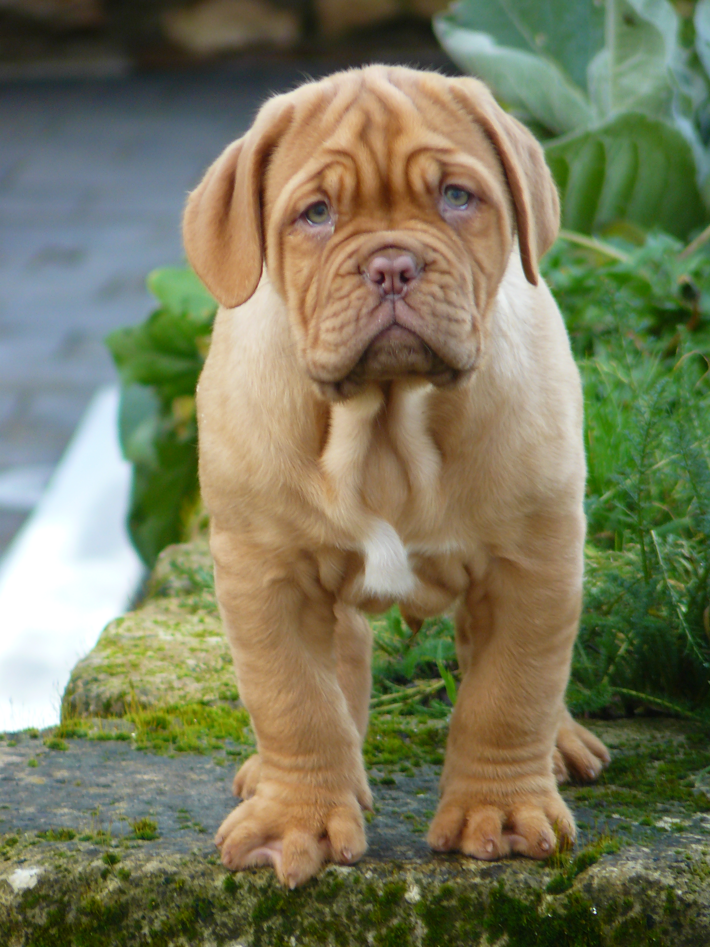 hathor des doyens bordelais